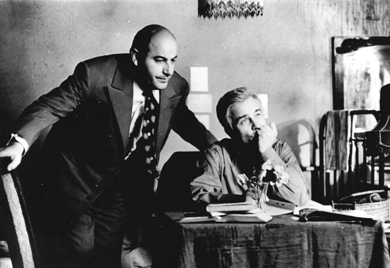 ADN-ZB DFF-11.9.71 Berlin: " Die Verschworenen " Manfred Krug (l.) und Armin Müller-Stahl sind zwei der Hauptdarsteller aus dem neuen vierteiligen Fernsehroman des DFF. Premiere des neuen Streifens ist am 11.9.71 um 20.00 Uhr im ersten Programm des DFF. Die Geschichte erzählt, wie sich 1944 fortschrittliche Kräfte aller politischen Richtungen im gemeinsamen Kampf zusammenfanden. Regie bei der neuen Sakowski-Verfilmung führte Martin Eckermann, für die Dramaturgie zeichnete Helga Korff-Edel verantwortlich.